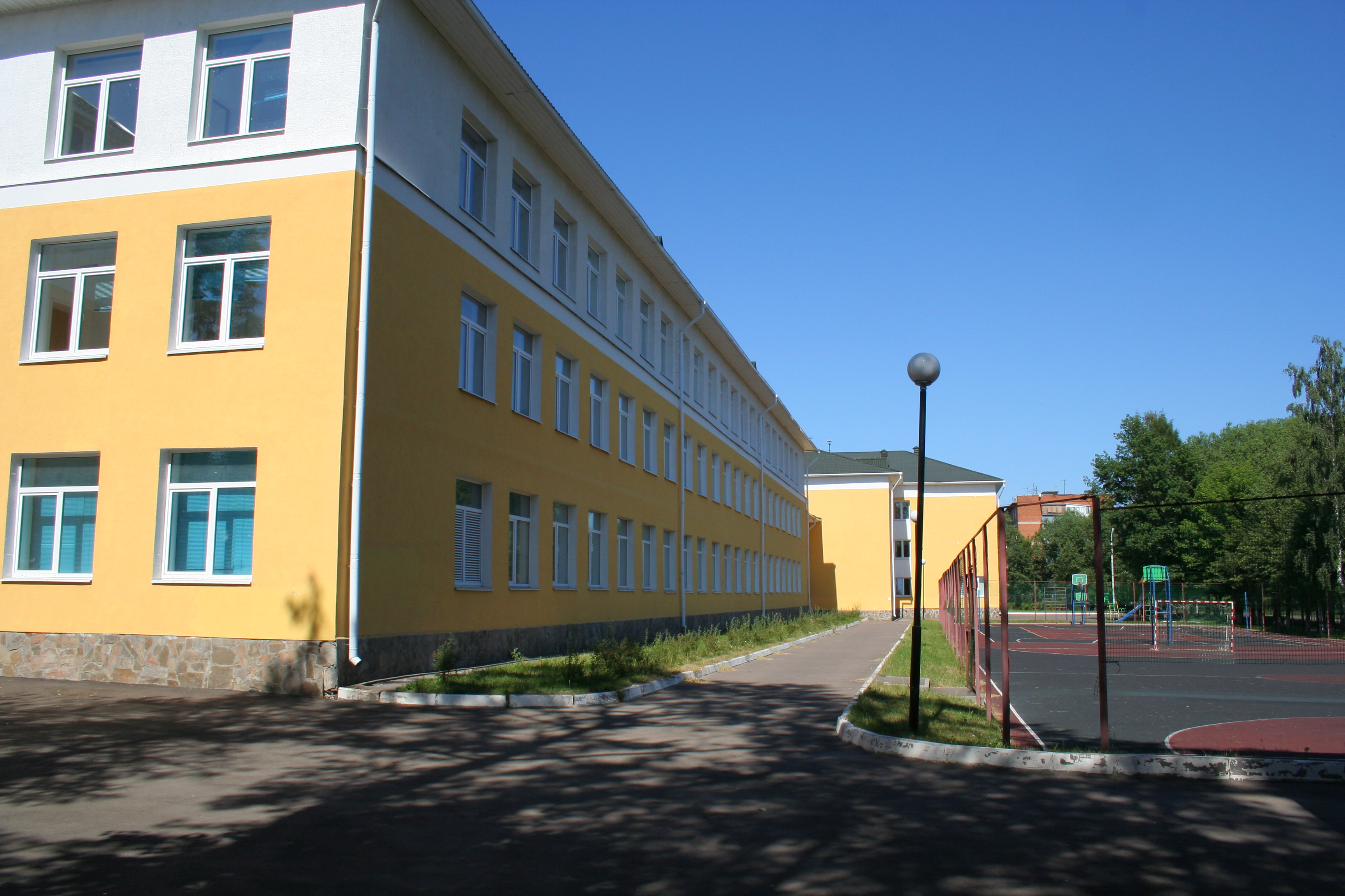 Eine Schule in der Siedlung Lwowski, Oblast Moskau, Russland.